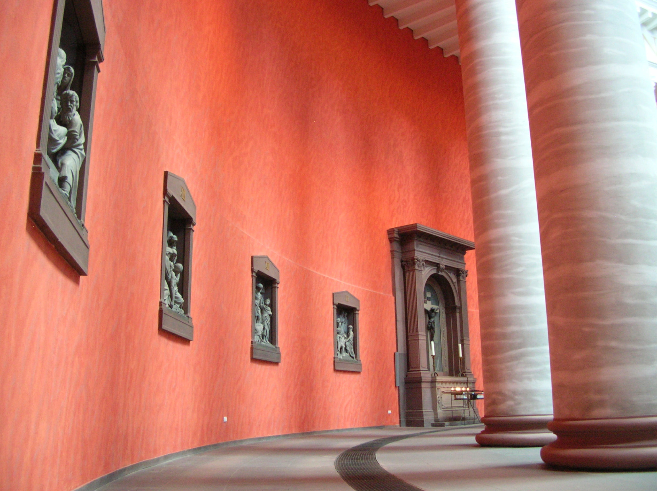 Darmstadt, kath. Kirche St. Ludwig, Umgang, Kreuzwegbilder